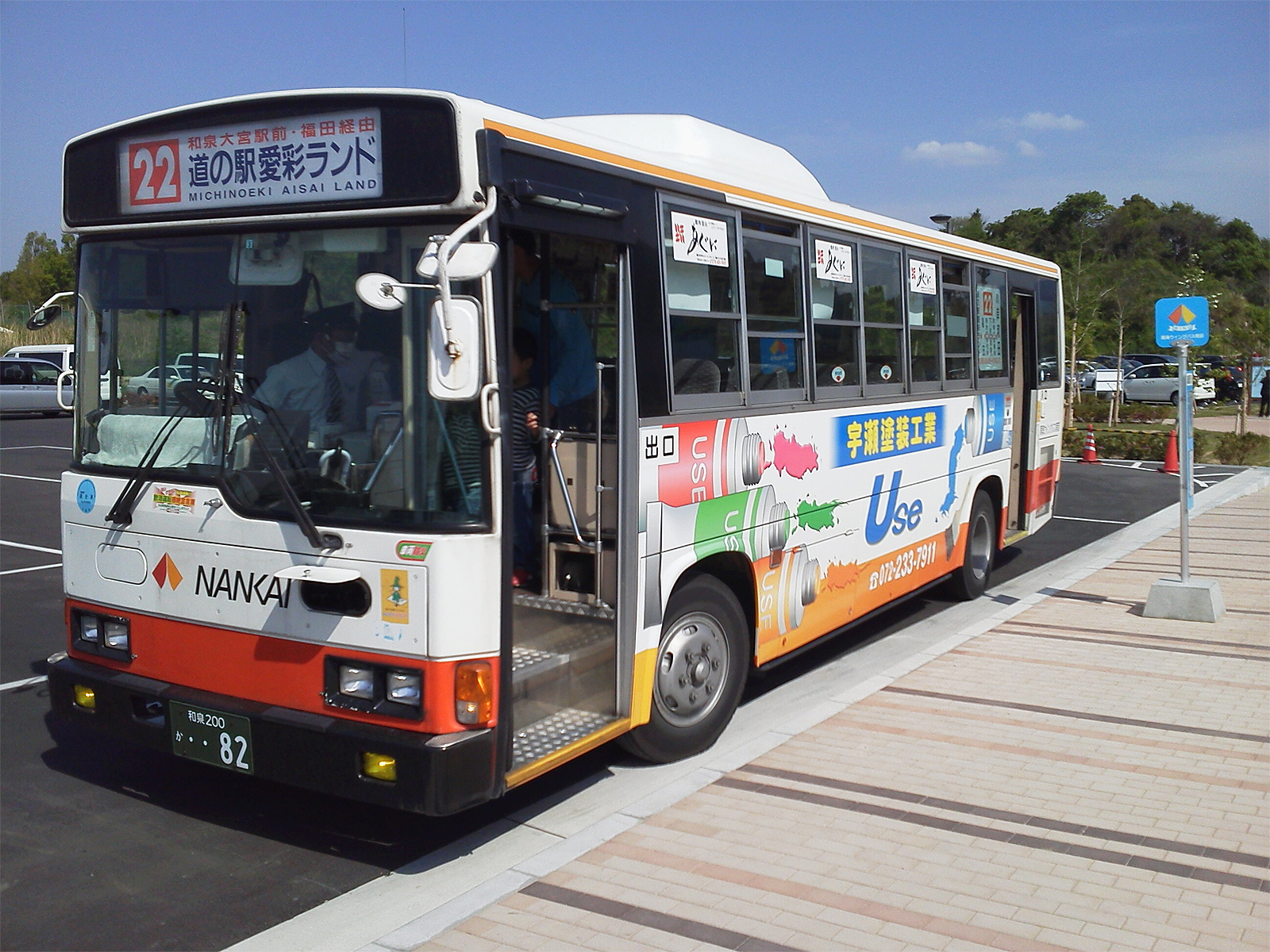 投稿者自身が大阪府岸和田市を走る、 『南海ウイングバス南部』の車両を撮影。